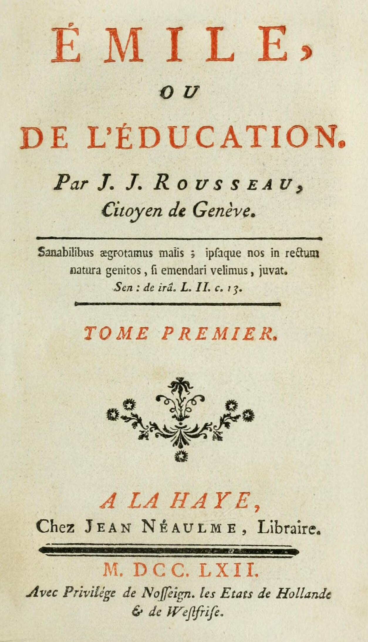 Title page from the first edition of Emile; Portada de la primera edición de Emilio, o De la educación.